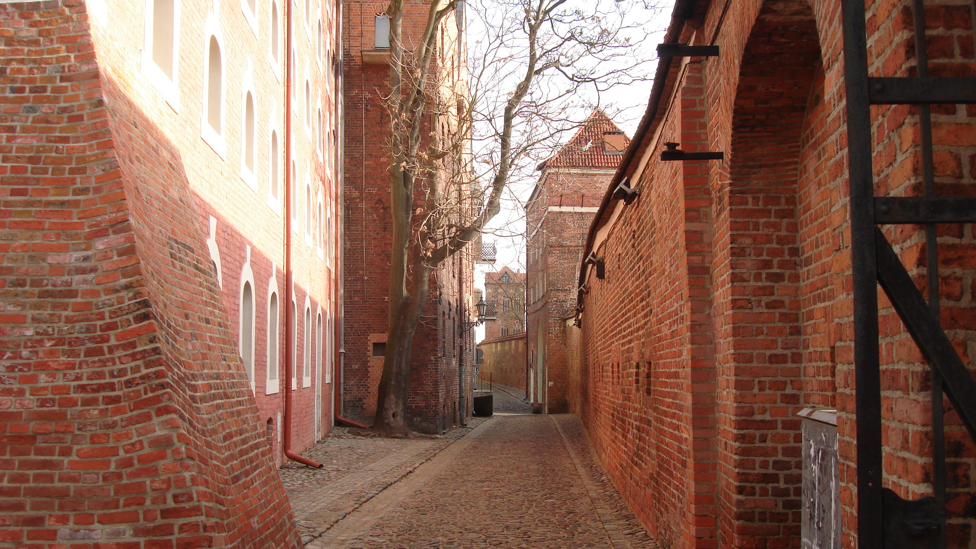 Ulica Bankowa w Toruniu, mury miejskie